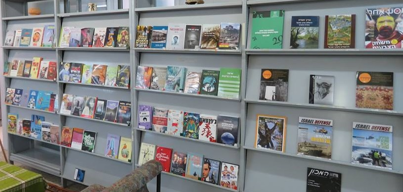 תצוגת כותרים חדשים